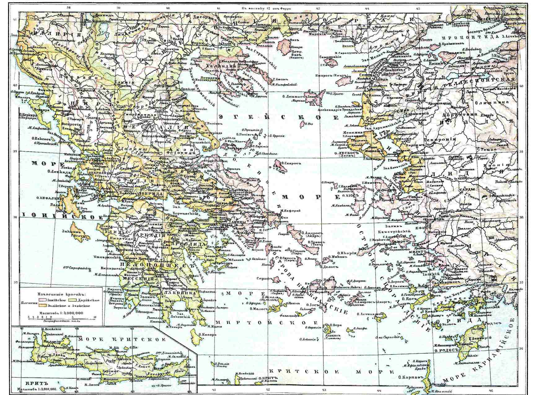 Карта Древней Греции из энциклопедии Брокгауза и Ефрона